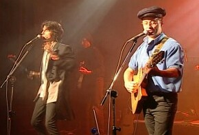 Dupla brasileira Kleiton & Kledir em imagem do acervo da TV Brasil.